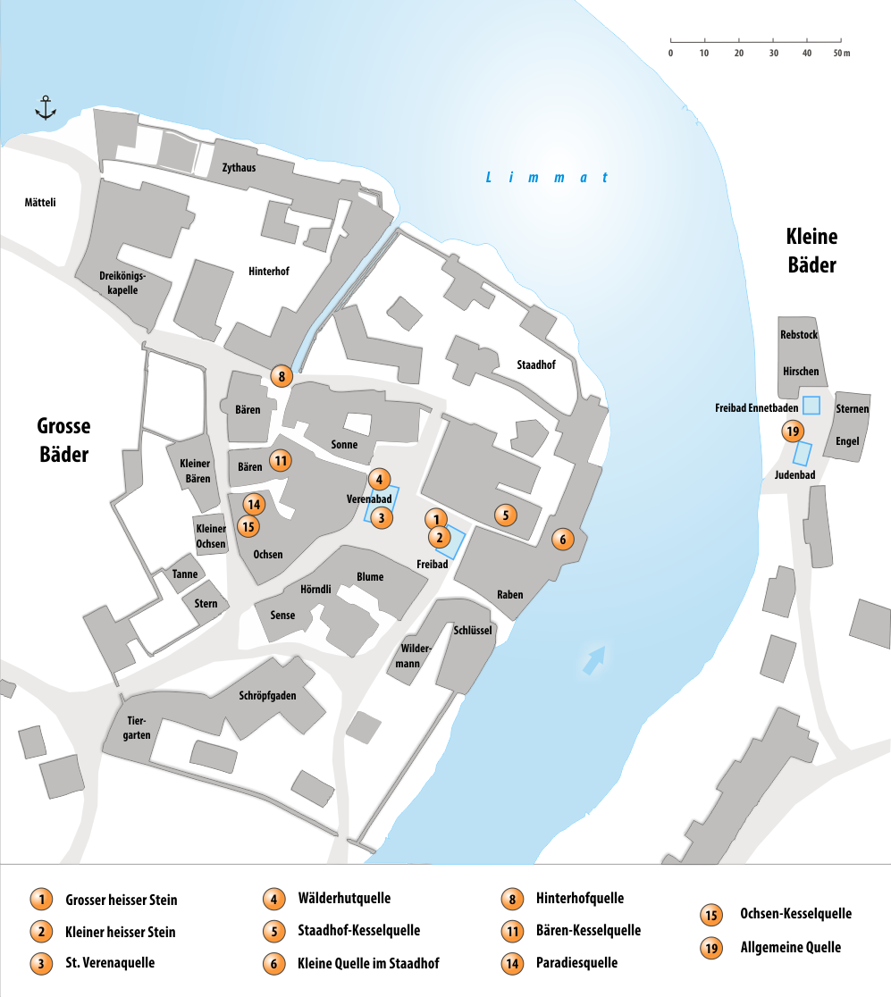 Übersichtskarte der Bäder von Baden und Ennetbaden um 1650